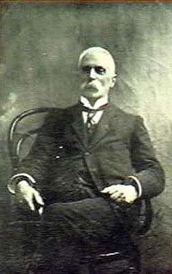 Andrea Balletti (1850-1938)